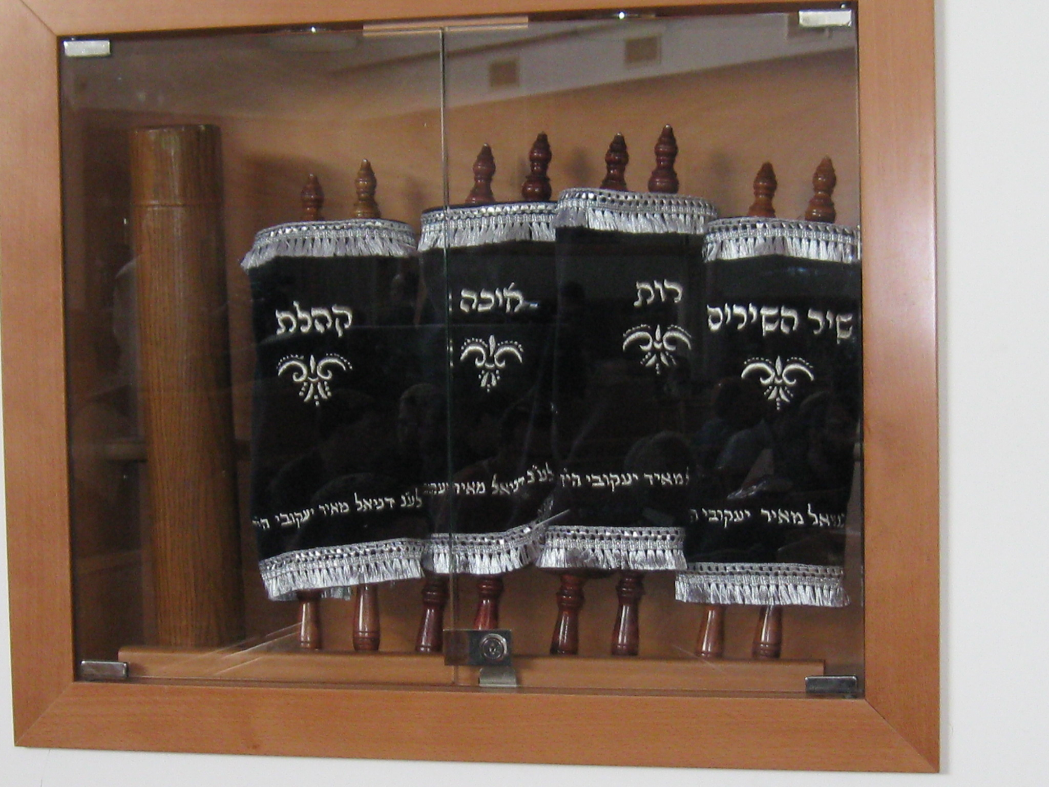 Five Megillot רישיון נוצר על ידי משתמש:Daniel Ventura